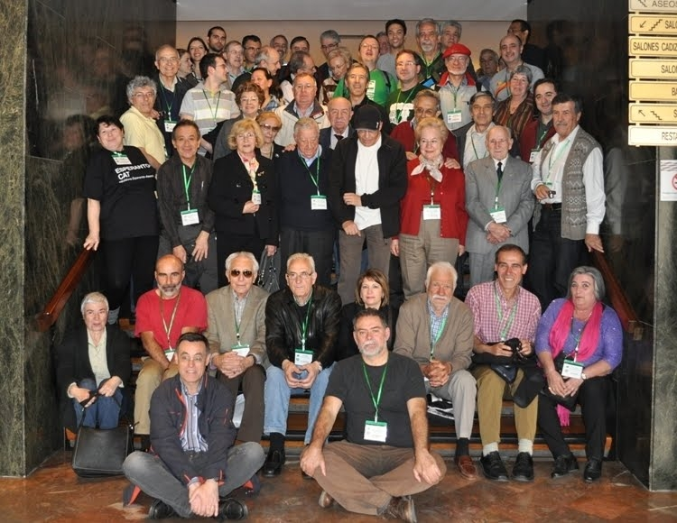 72-a Hispana Kongreso de Esperanto